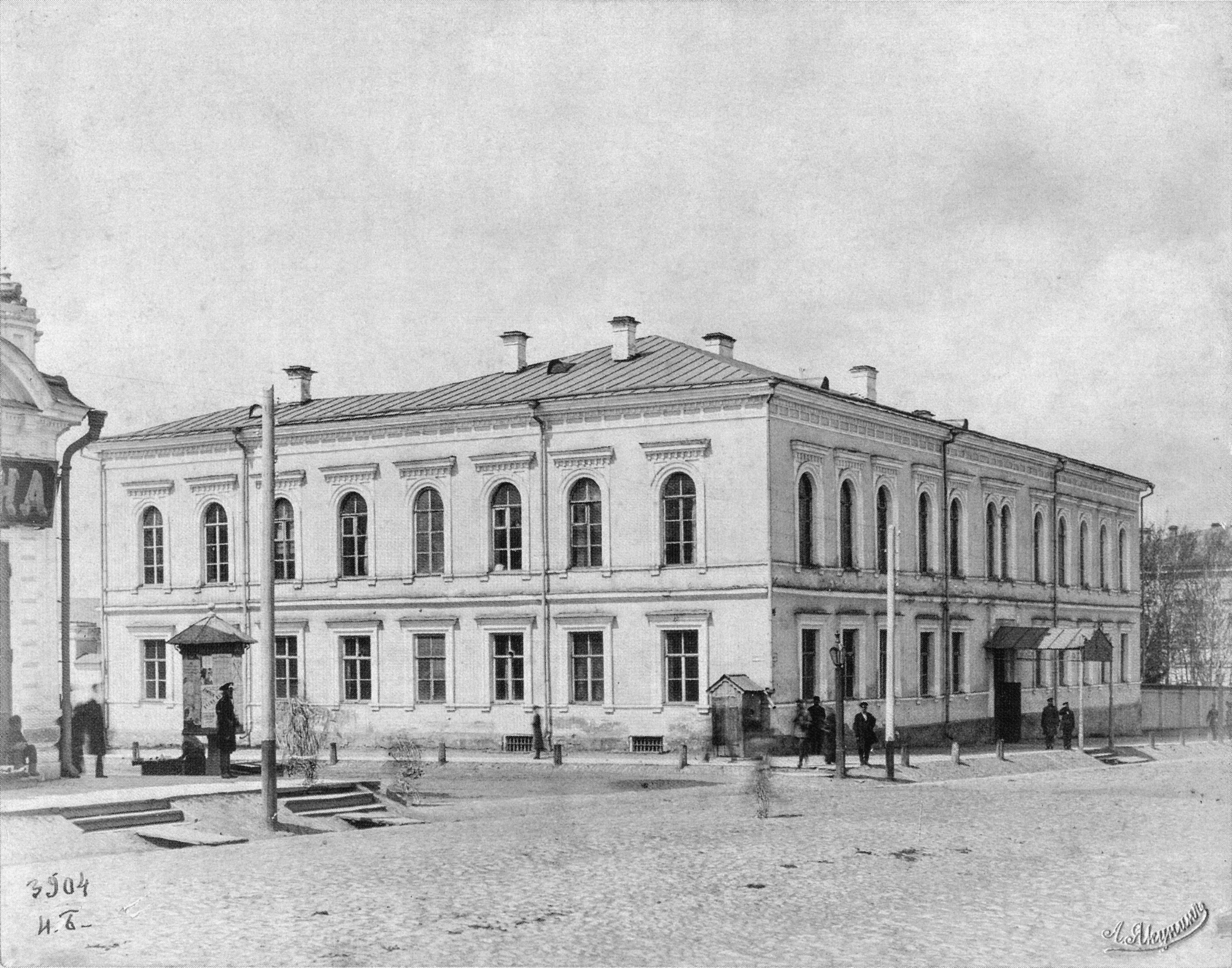 Здание Пермской казённой палаты до ремонта в 1890-х